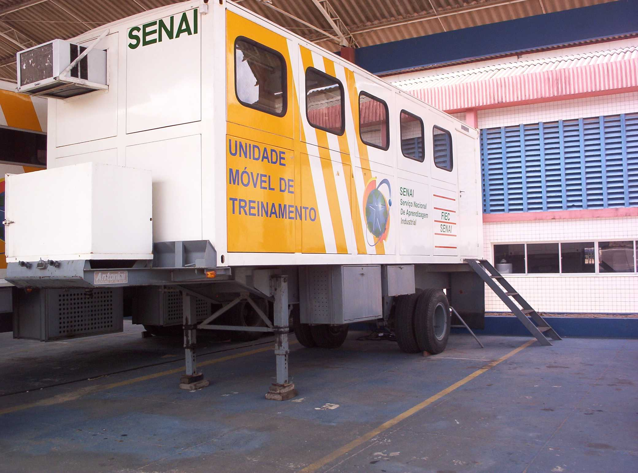 Unidade móvel de capacitação do SENAI Ceará